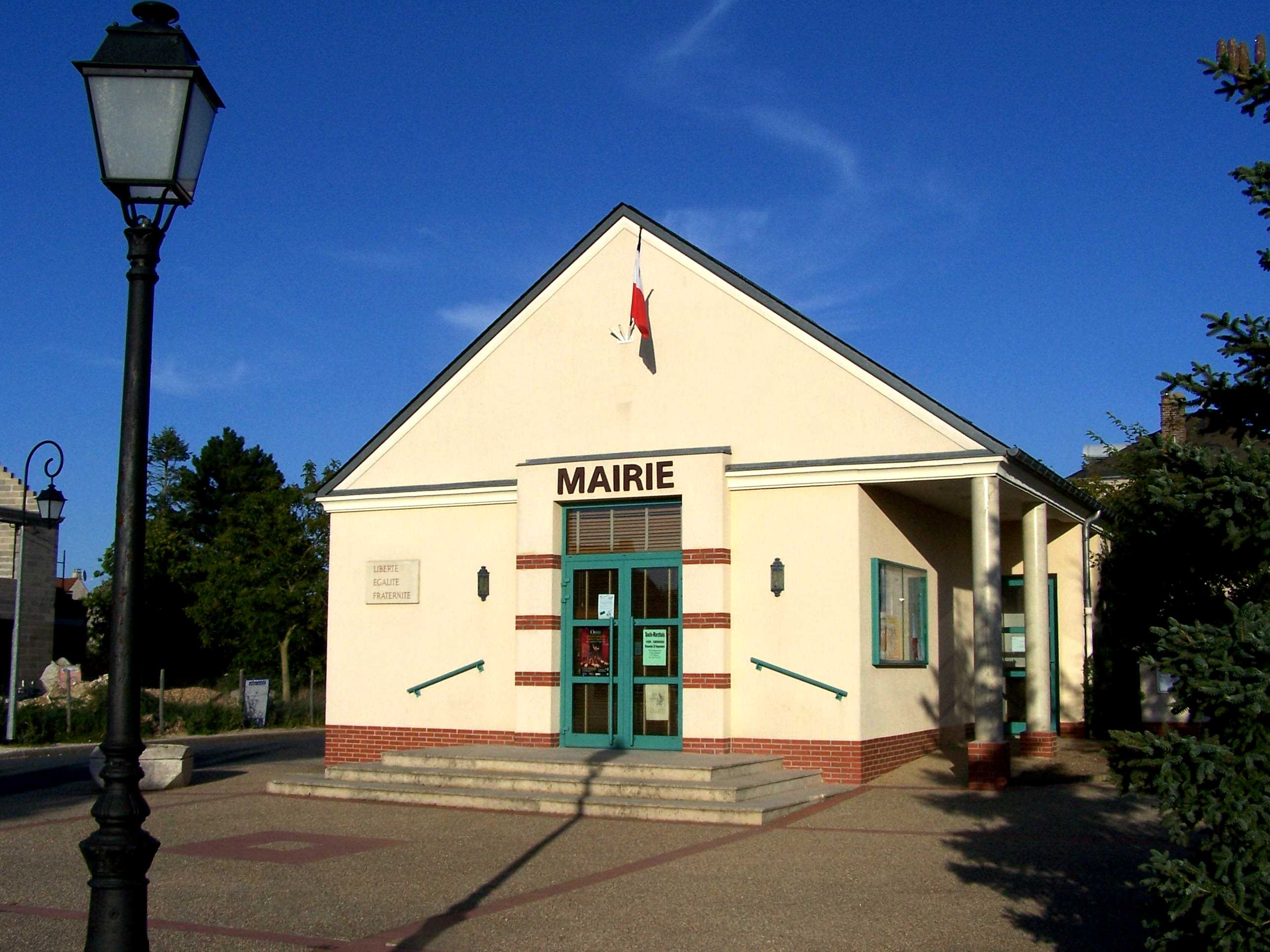 Mairie de Saulx-Marchais (Yvelines, France)